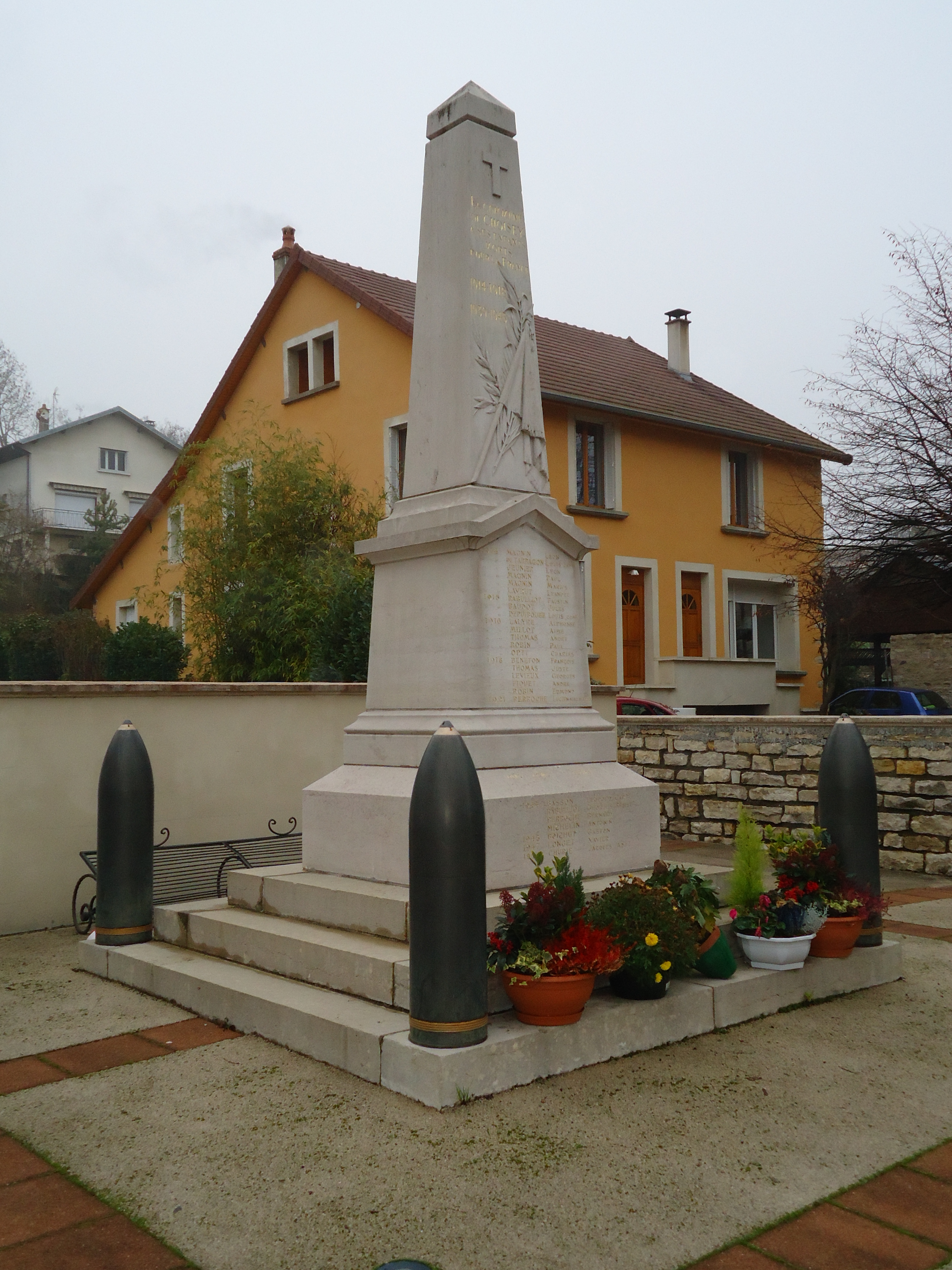 Monuments aux morts de Choisey